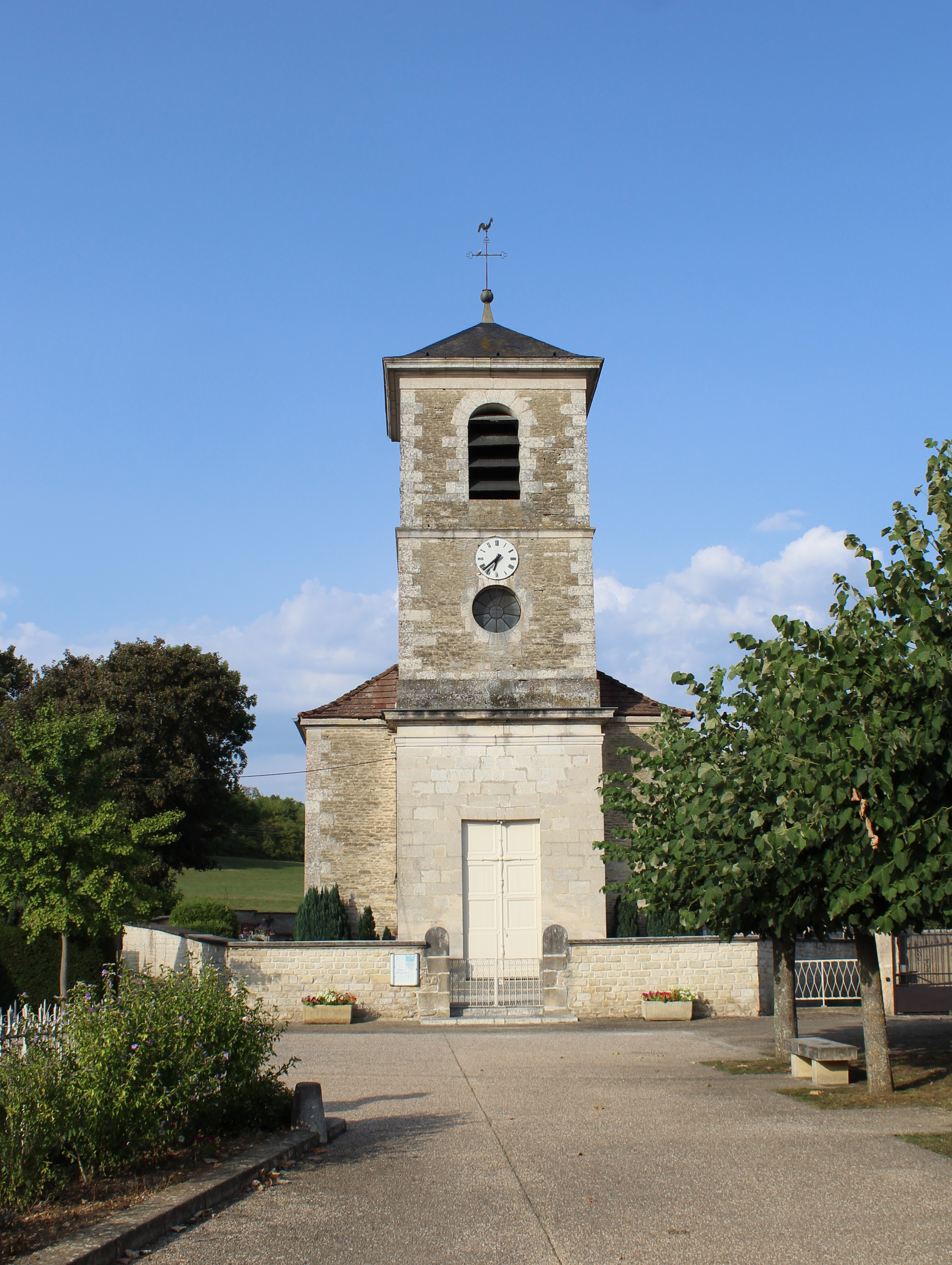 L'église